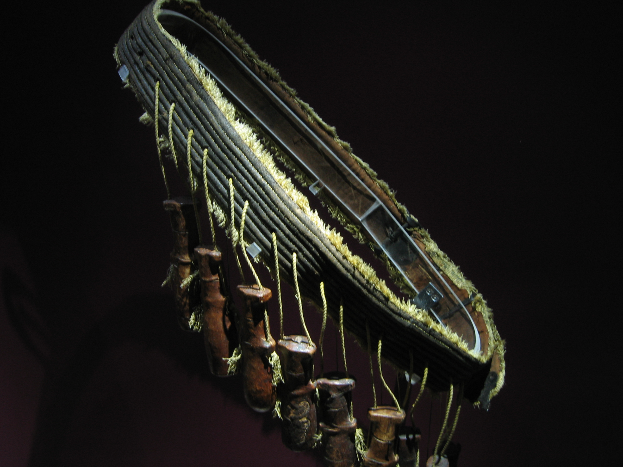 Bandouilière de mousquetaire France 1640, chaque étui contient la dose de poudre nécessaire pour armer et effectuer un tir